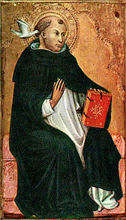 Saint Thomas d'Aquin Licence: d'après tout le site peut être copié sans autorisation notre seul but est la diffusion gratuite des meilleurs livres de l'église catholique romaine : ceux des docteurs de l'église, des pères de l'église et des grands mystiques catholiques